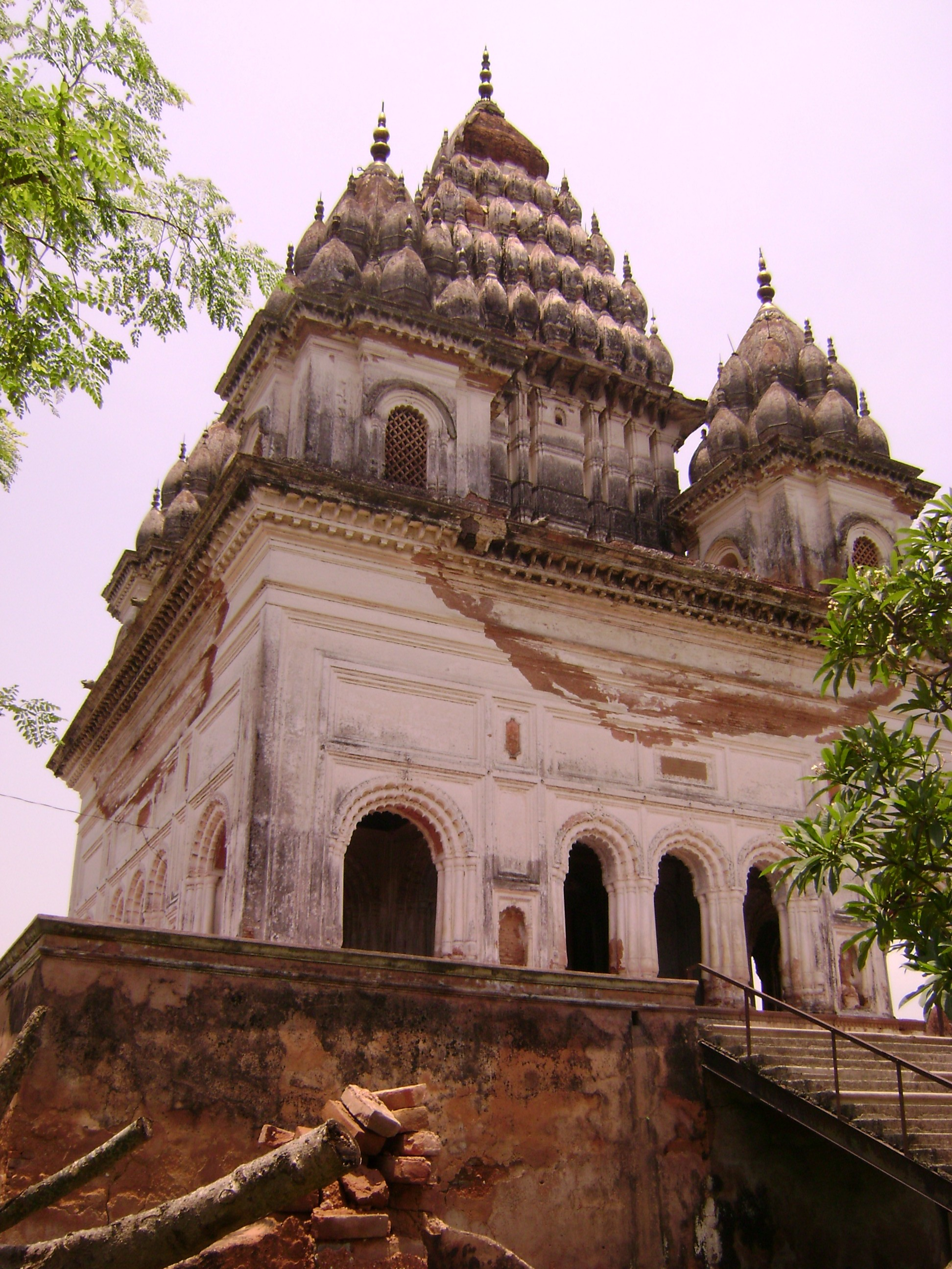 Puthia Mandirs, Chapai Nababgonj, Bangladesh